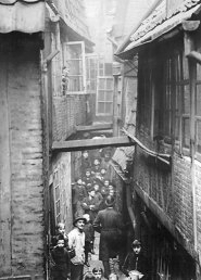 Blick ins Gängeviertel in Hamburg 1893